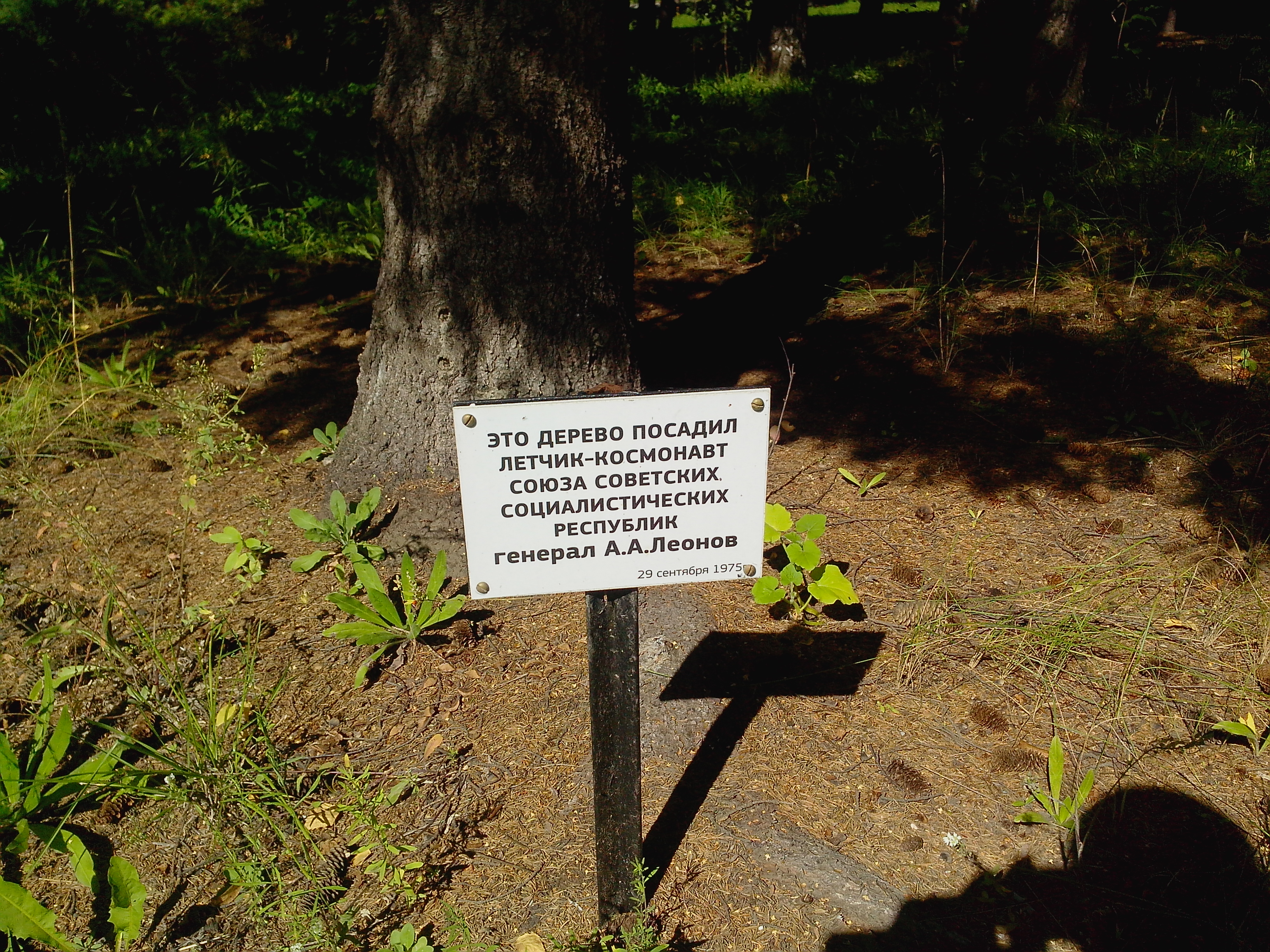 Дерево А.А. Леонова, посаженное на проспекте Лаврентьева в Новосибирске